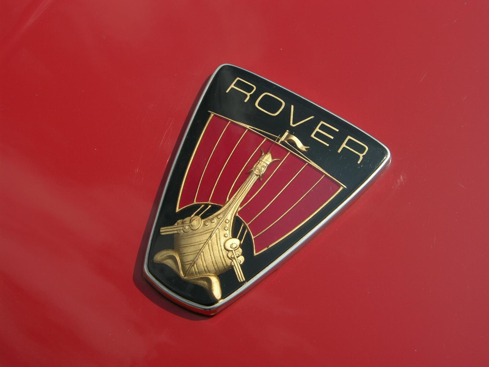 Rover 3500 V8